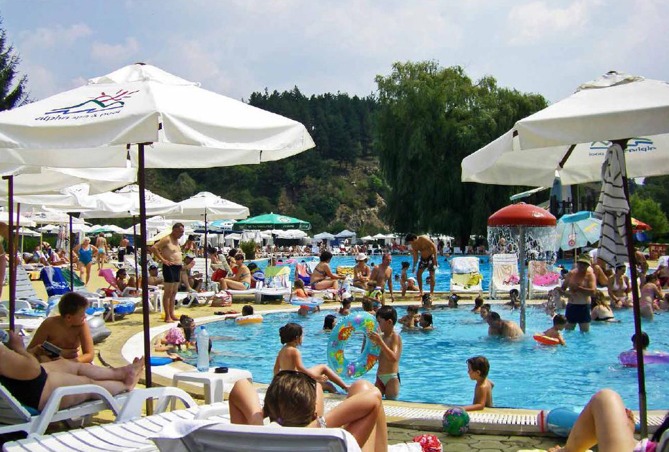 Добринище Плаж